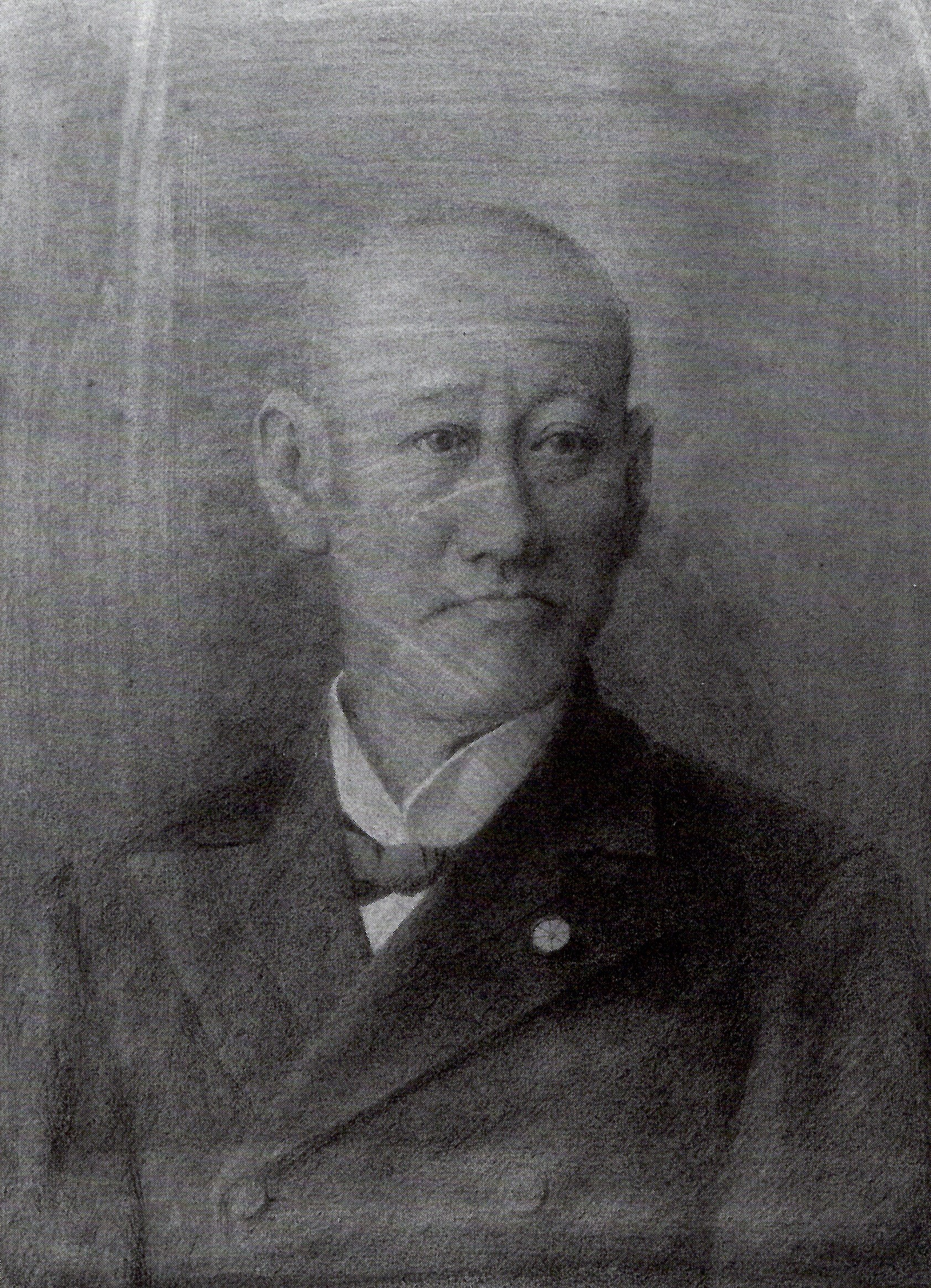 毛利元敏の肖像。